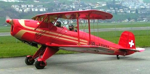 CASA 1.131-E SERIE 2000 (spanischer Lizenzbau der Bücker 131 Jungmann-Doppeldecker)